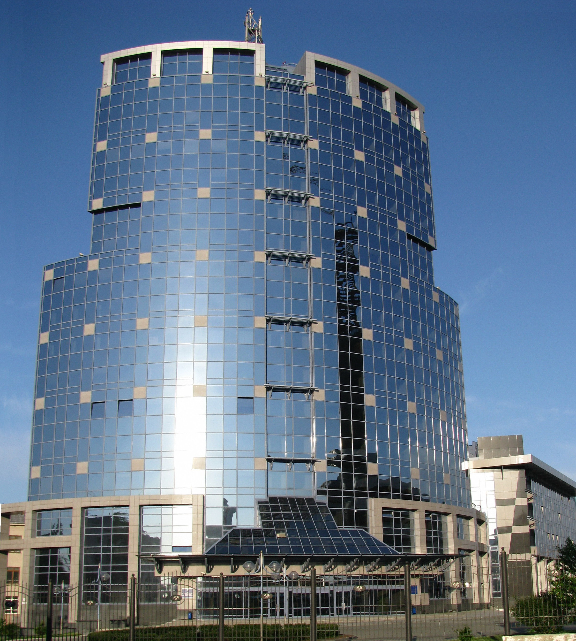 Дорожный диспетчерский центр управления перевозками Свердловской магистрали (контролирует перевозки на территории Свердловской, Пермской, Тюменской областей, Ханты-Мансийского и Ямало-Ненецкого автономных округов.